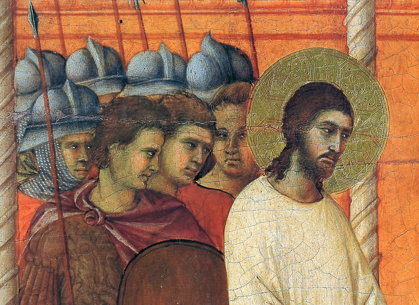 Duccio_Maesta_detail3.jpg